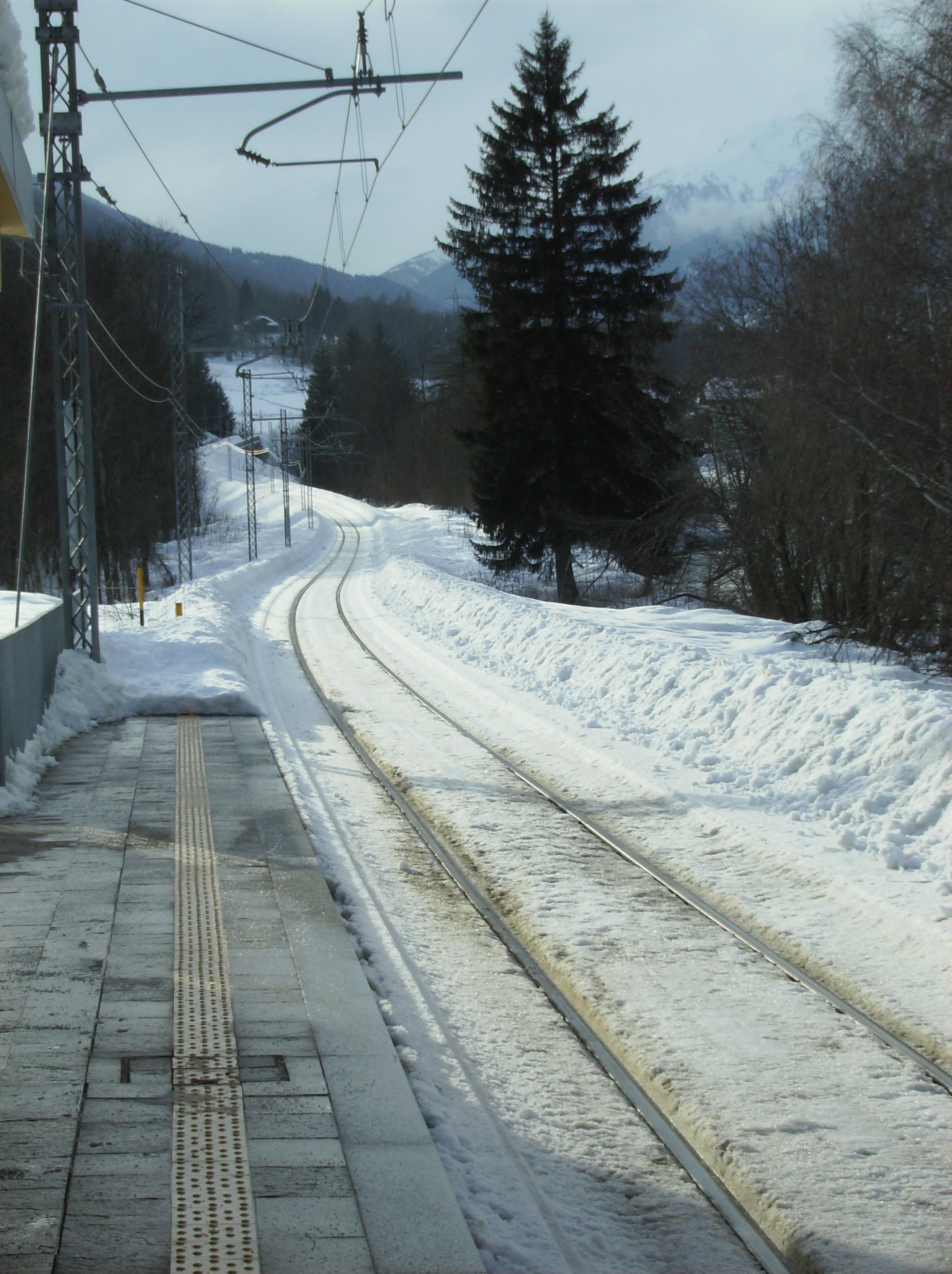 Gare de Daolasa - Commezzadura- Italie